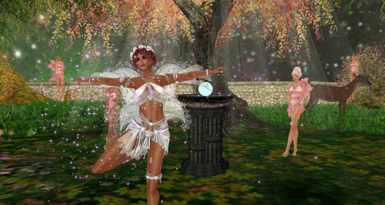 Starlite Dancers at the Starlite Theater in Second Life